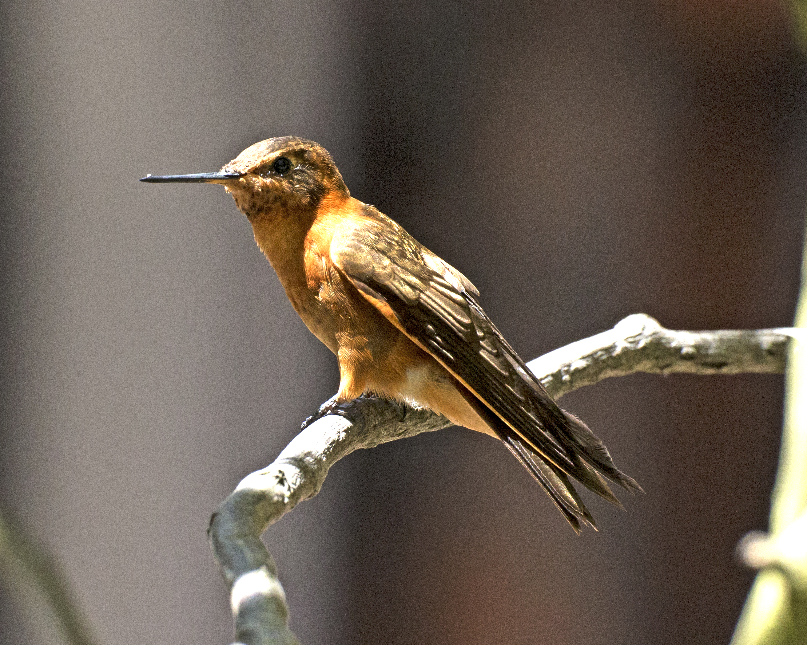 Shining Sunbeam CF2P1352